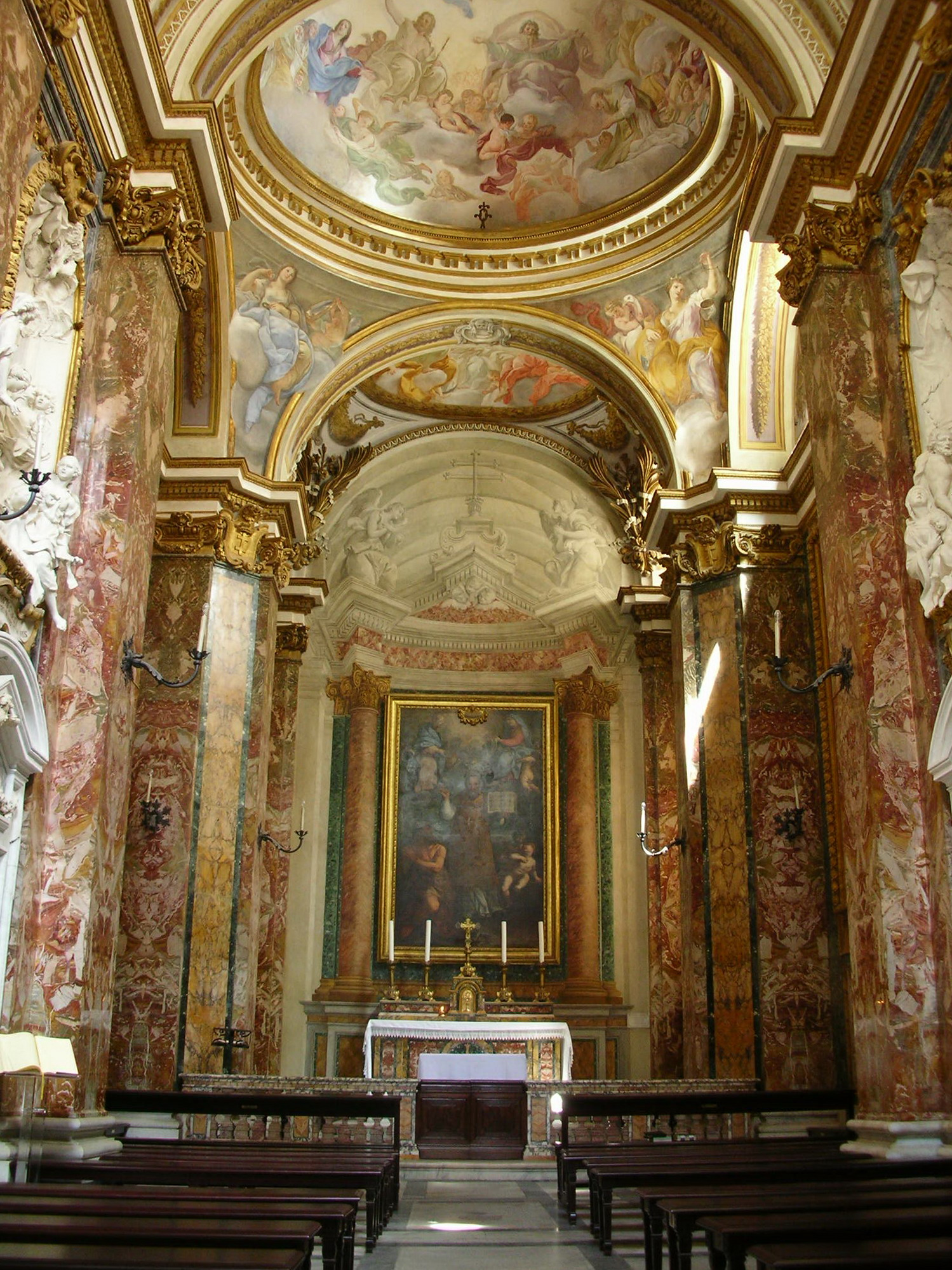 Interior, San Nicola dei Lorenesi, Rome